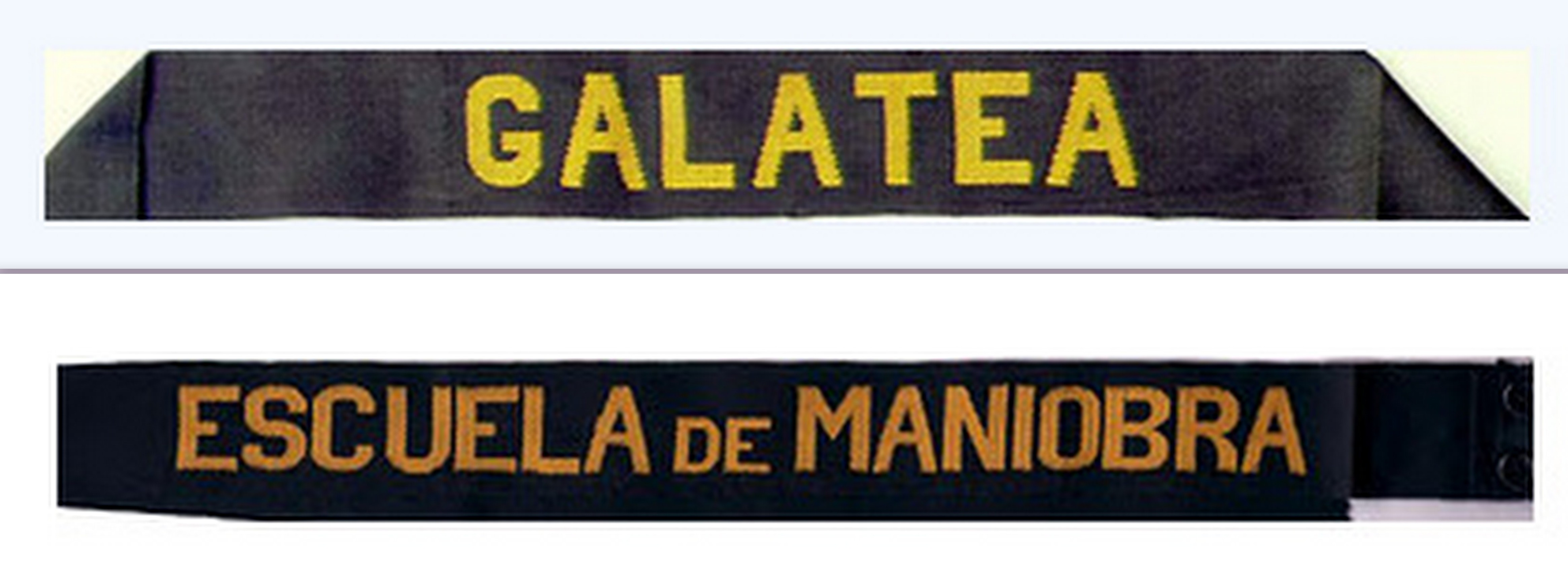 Cintas de Lepanto, realizadas para la página Web "Buque Escuela de Maniobra Galatea.